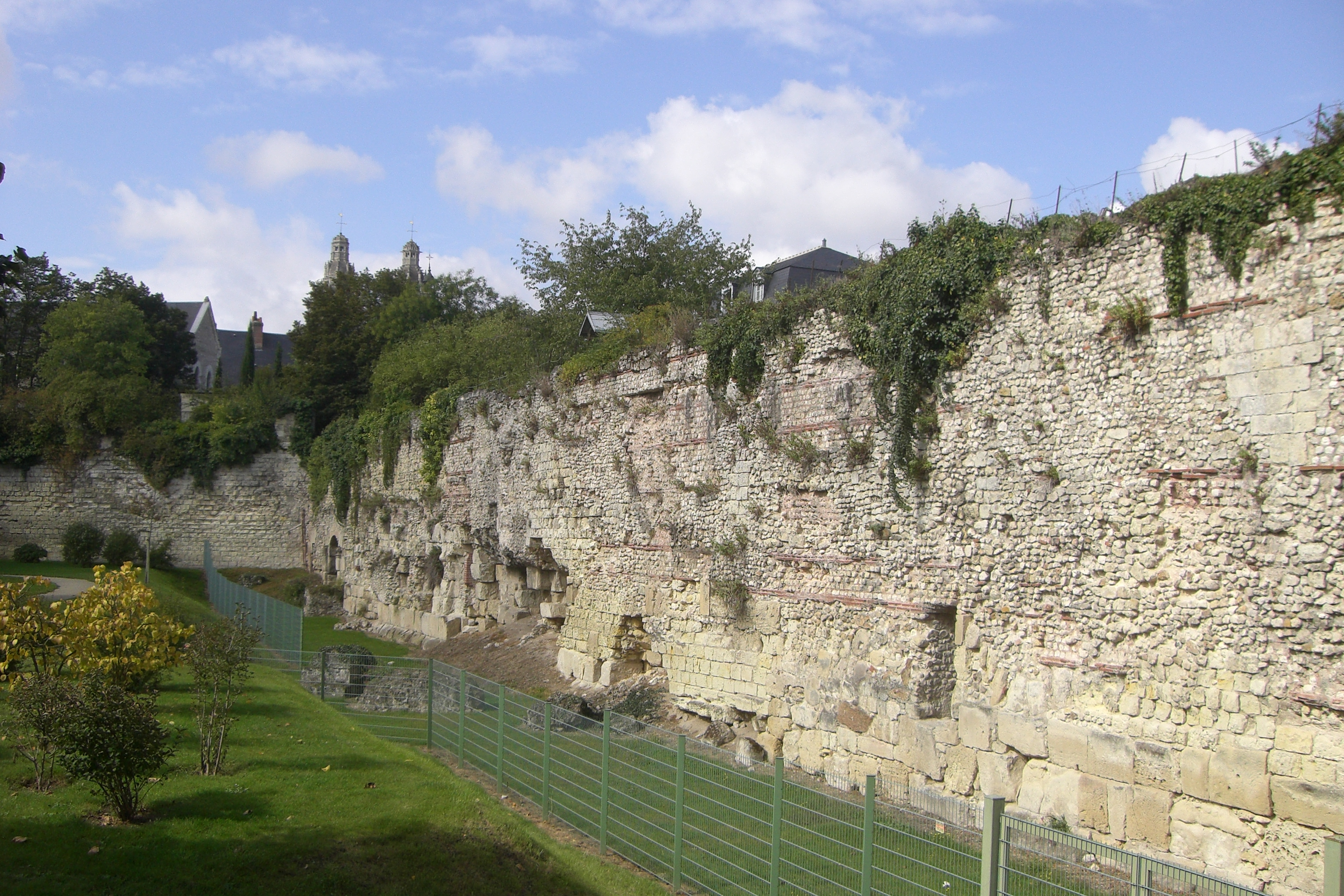 Vue de l'ancien Castrum de Caesarodunom IVe siècle.